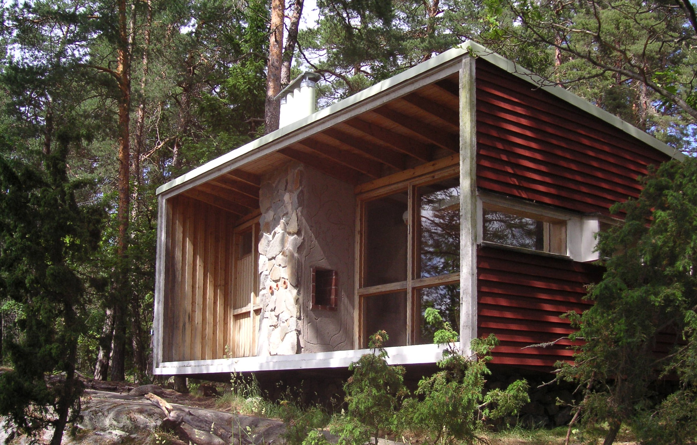 Ralph Erskins första bostad "Lådan"